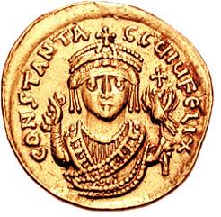 See File:Solidus-Tiberius II-Sear 421x422.jpg.